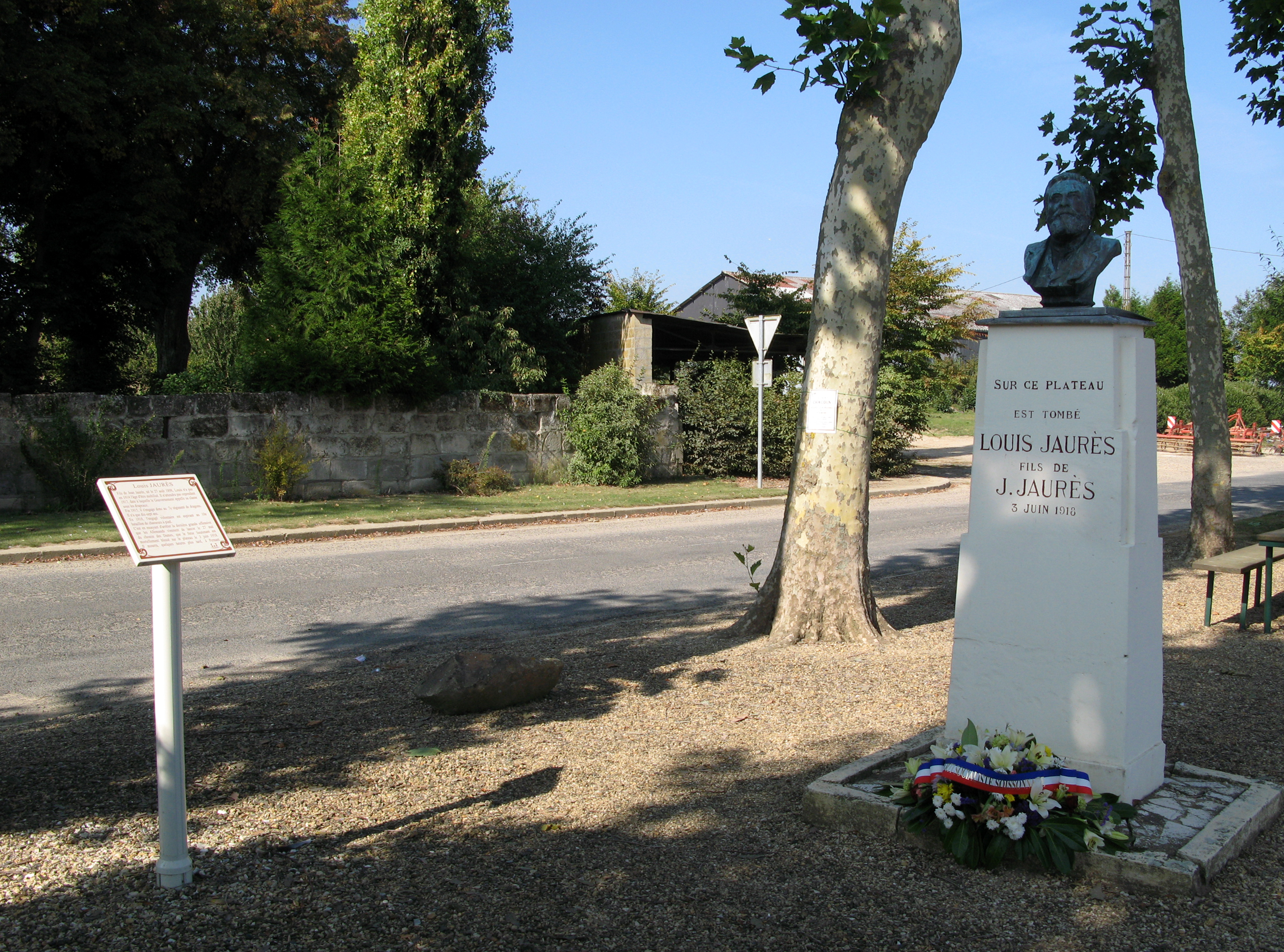 Chaudun (Aisne, France) - Le monument Louis Jaurès, à l'entrée du village. On remarque qu'il est parfaitement entretenu, qu'il est présenté par un panneau informatif spécial (à gauche) et qu'il est décoré d'une couronne fraîchement déposée (portant le ruban tricolore avec la mention "Parti socialiste Soissons"). .